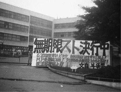 東京教育大の移転反対闘争で、文学部自治会は無期限ストライキに入った。正門前からE館（右）と本館（事務棟）を望む